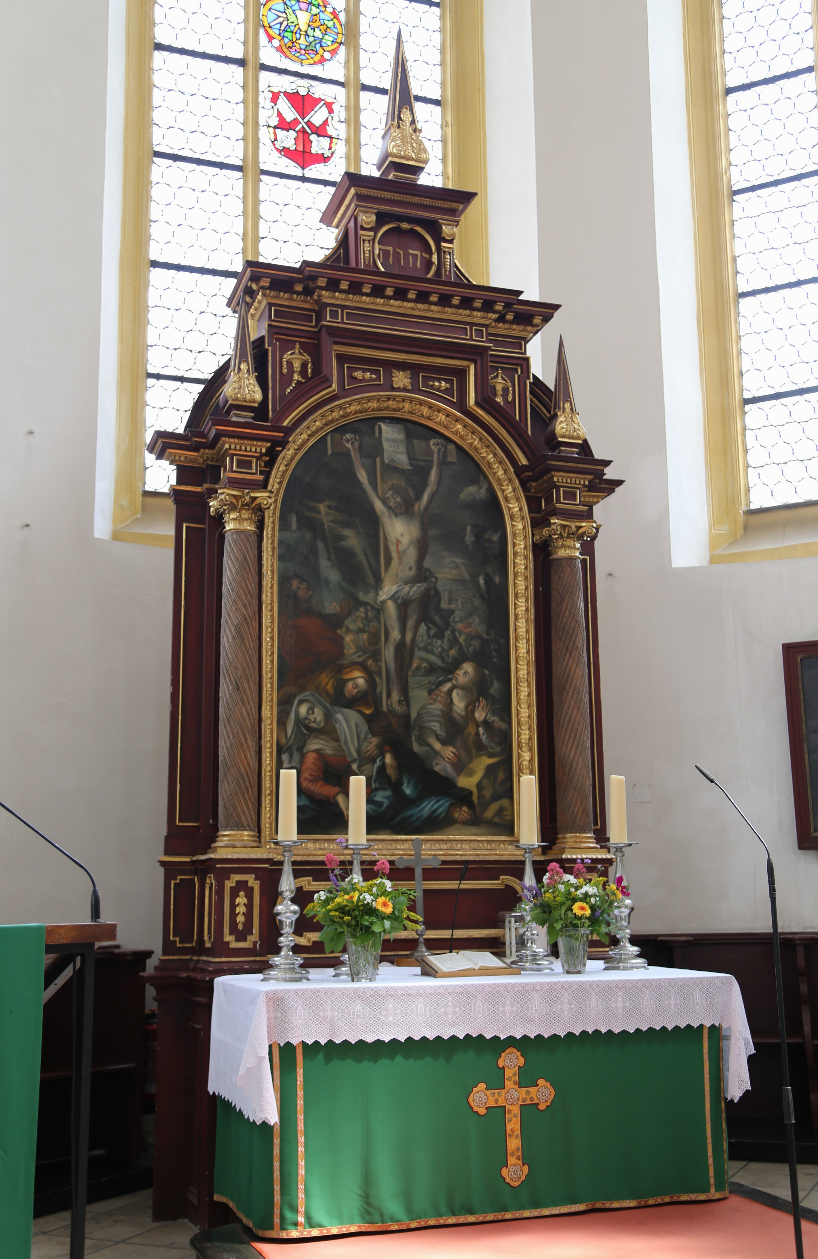 Neupfarrplatz 1; Evangelisch-Lutherische Neupfarrkirche, Saalkirche mit polygonalem Chor und zwei Flankentürmen mit Pultdachanbauten, Frührenaissance, 1519–86 nach Plänen von Hans Hieber, westlicher Zentralbau, Neurenaissance, 1860–63 von Ludwig Foltz; mit Ausstattung; errichtet als Wallfahrtskirche zur Schönen Maria nach Zerstörung der Synagoge, seit 1542 Evangelisch-Lutherische Pfarrkirche